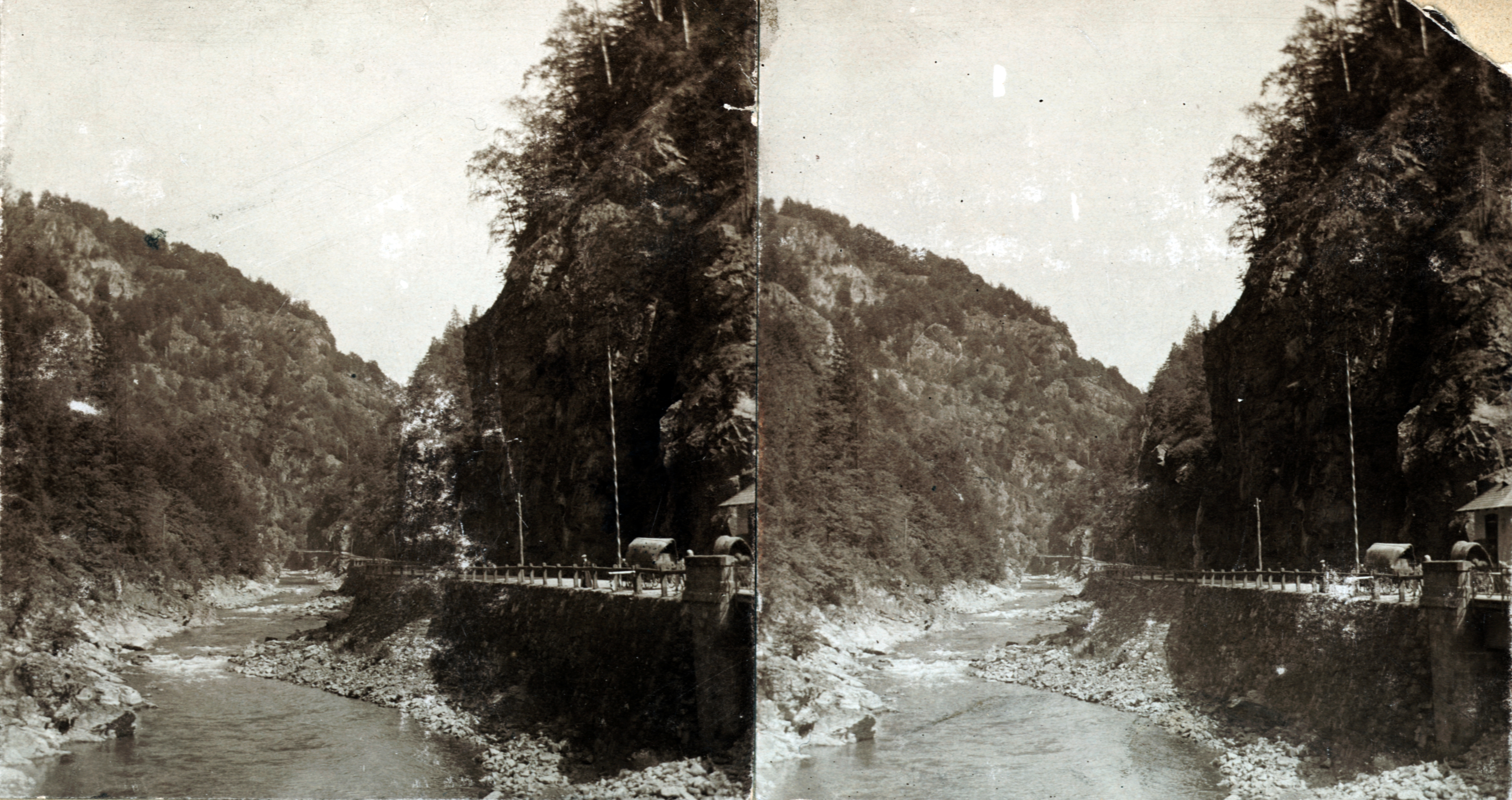 Zsil-folyó, Szurdok-szoros. Magyar-román határátkelő. Location: Romania, Transylvania Tags: stereophoto Title: Zsil-folyó, Szurdok-szoros. Magyar-román határátkelő.